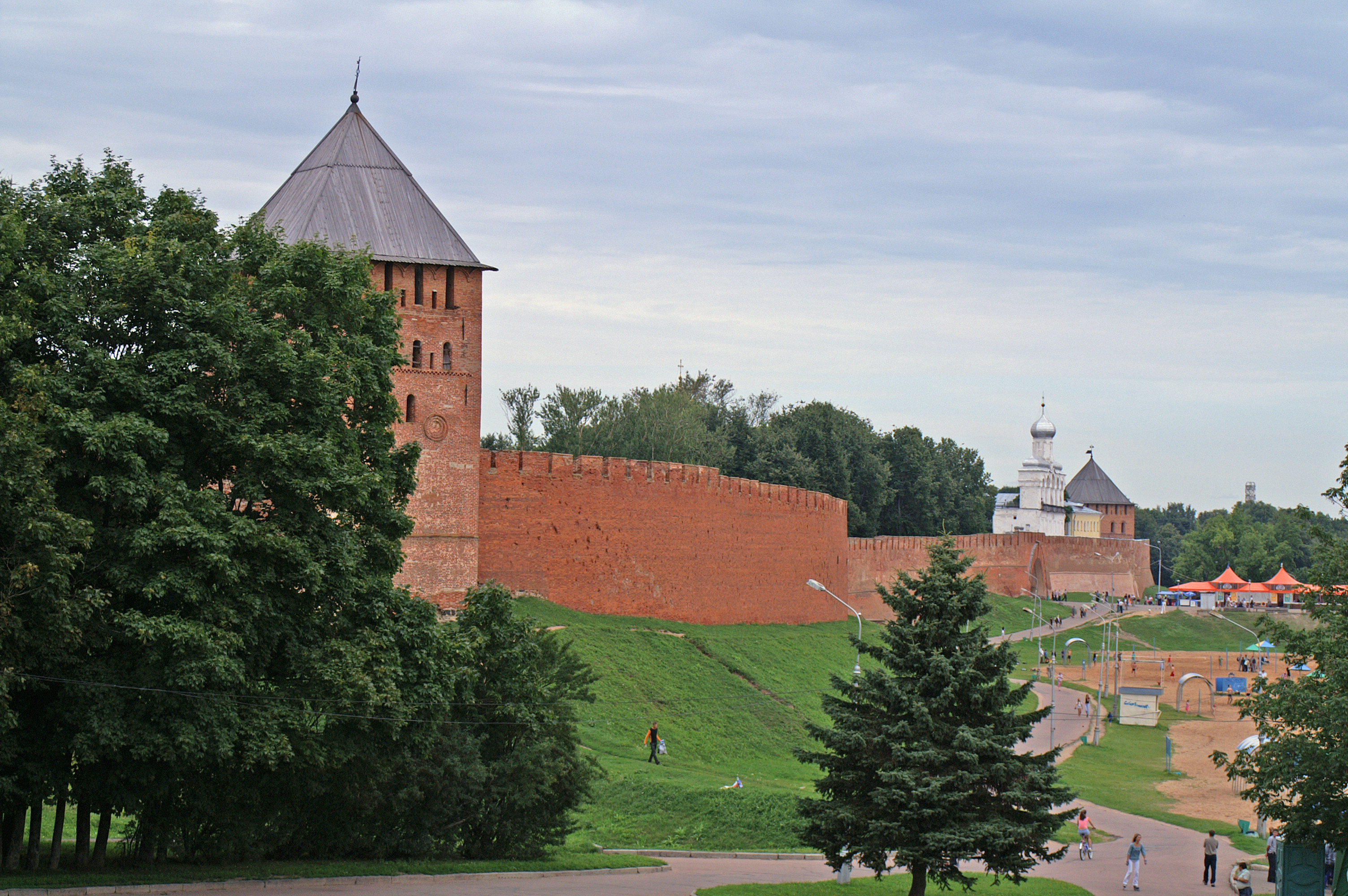 Weliki Nowgorod, Russland